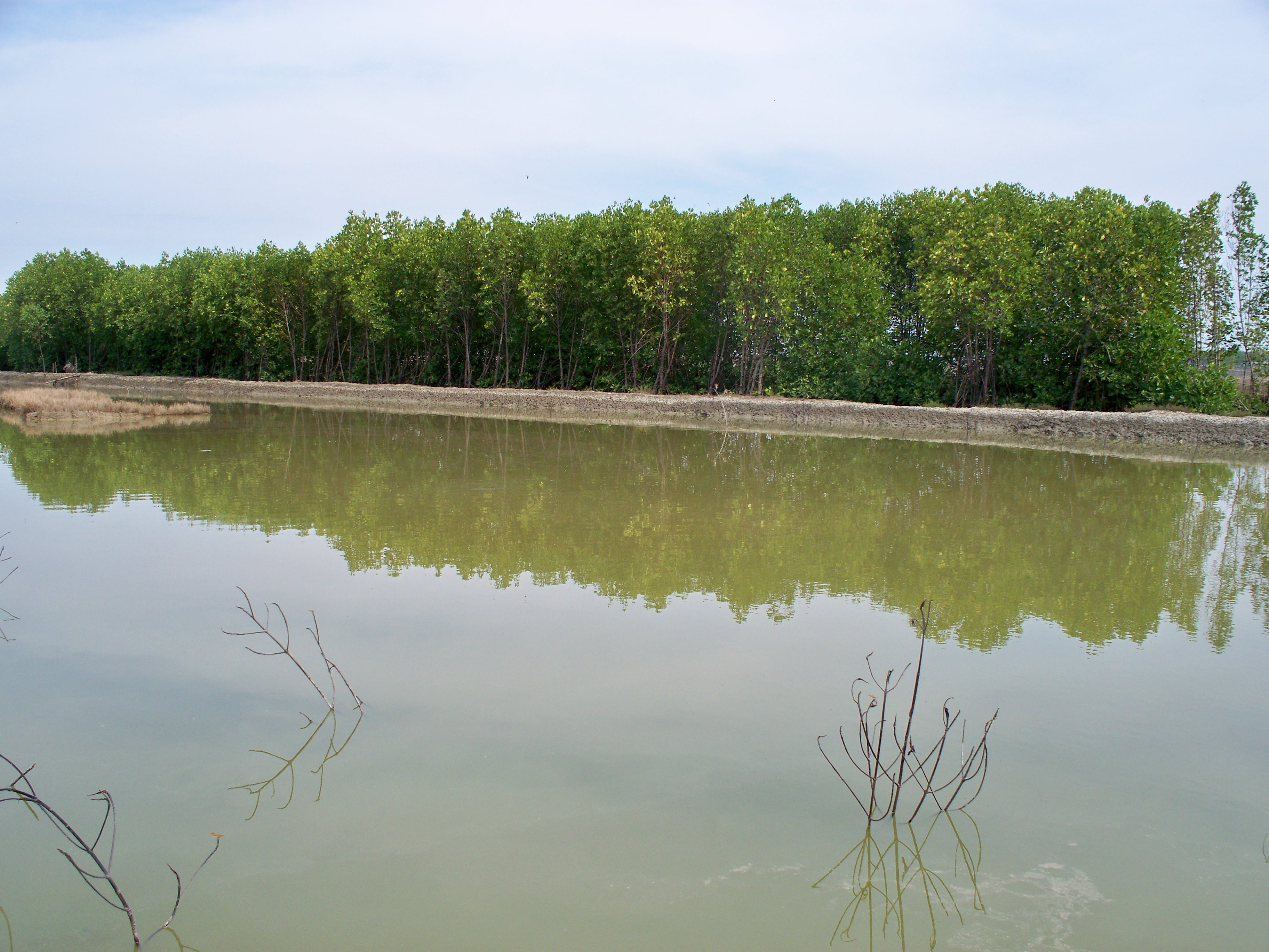 Mangrove dan Tambak